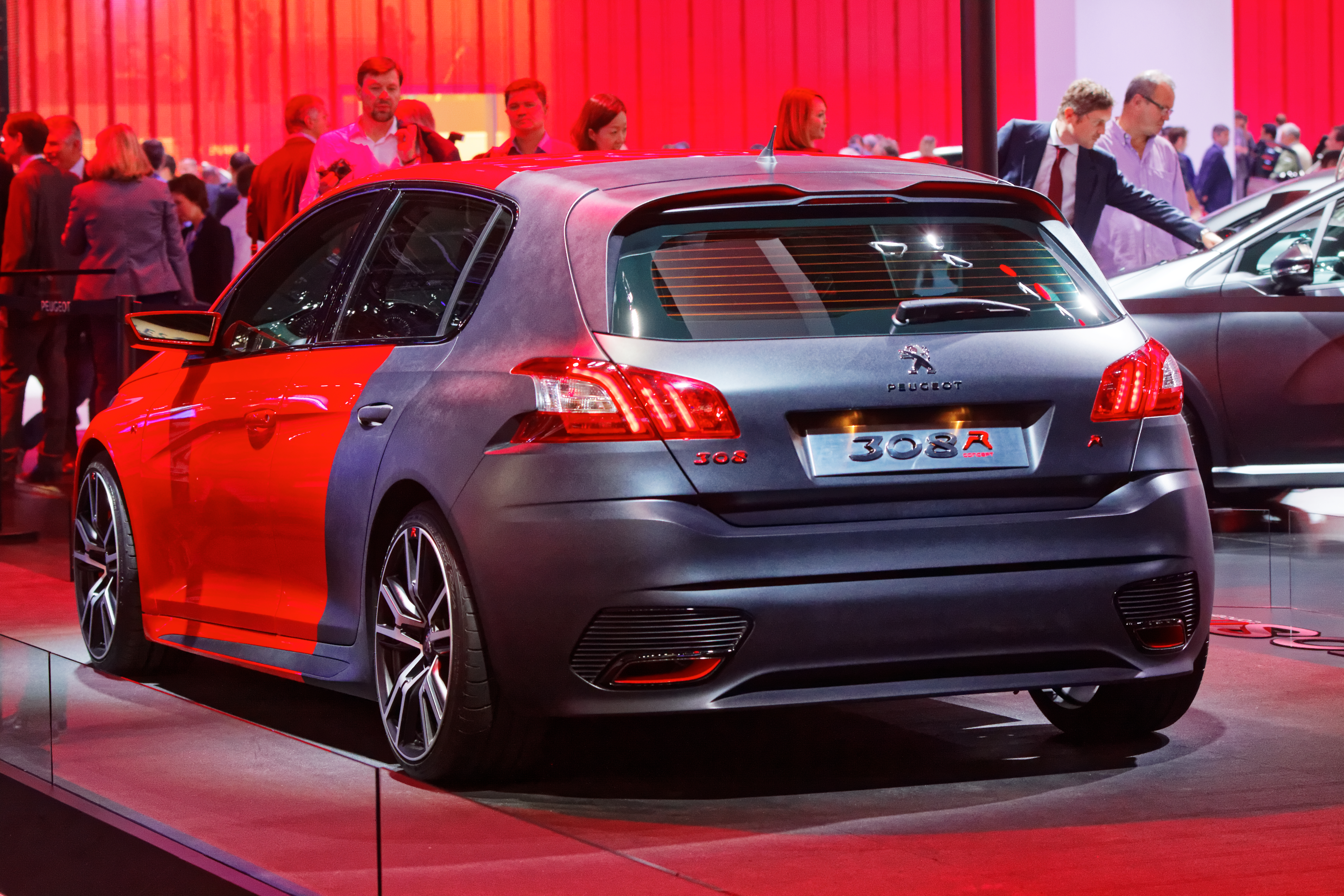 Une Peugeot 308 R Concept présentée lors du mondial de l'automobile de Paris 2014.